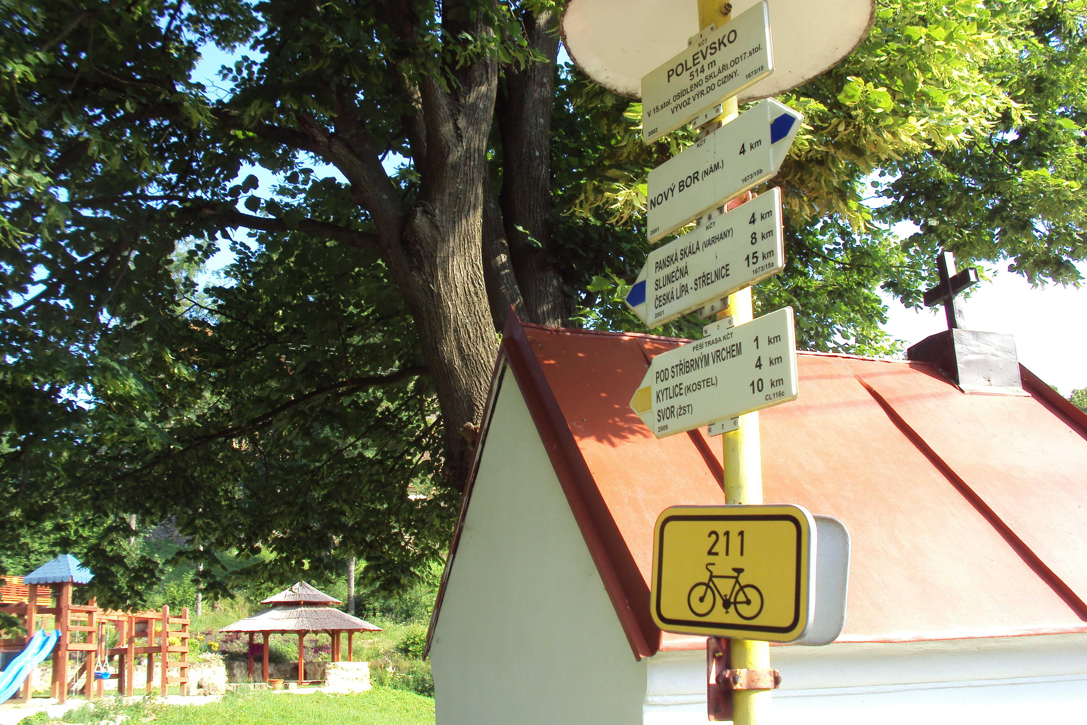 Turistický rozcestník v obci Polevsko